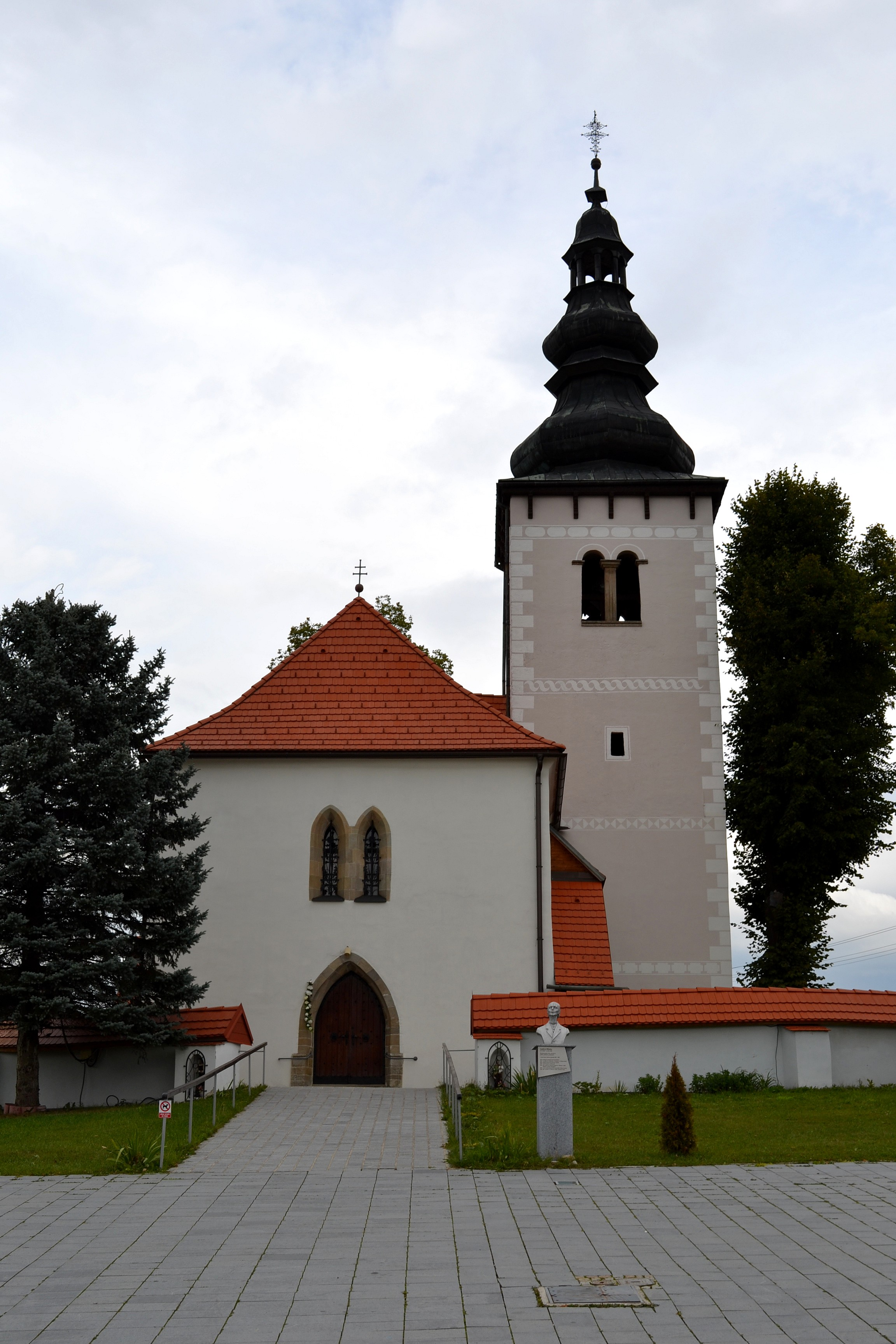 Liptovské Sliače (okr. Ružomberok), Kostol svätých Šimona a Júdu; celkový pohľad